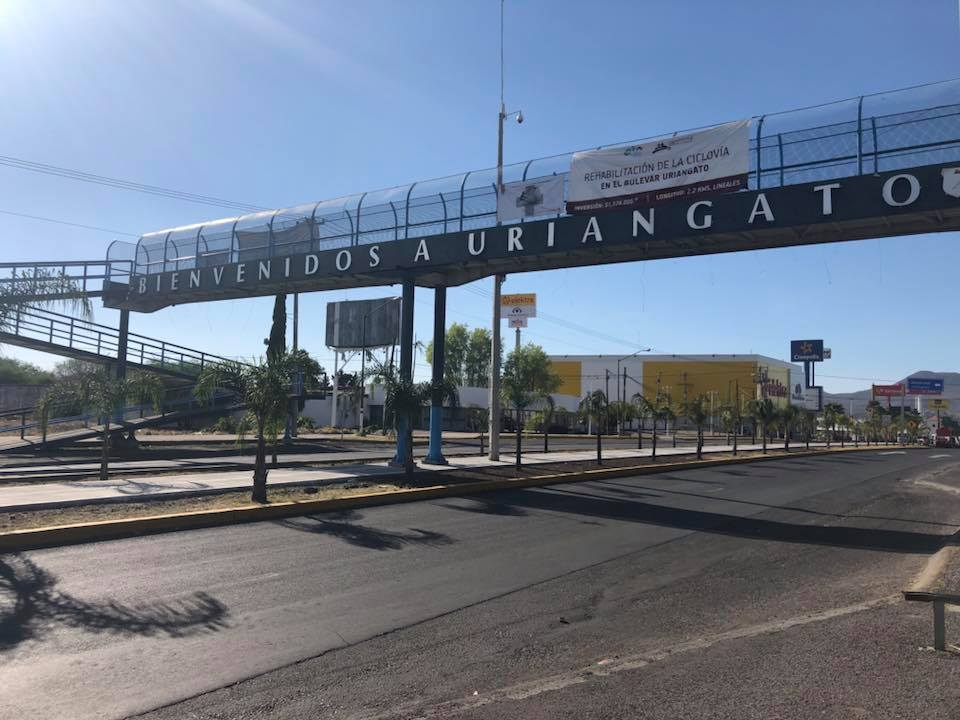 Centro Comercial Galerías Metropolitana Uriangato